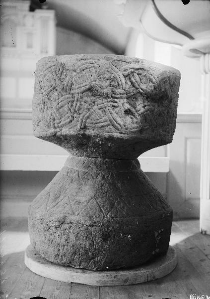 Dopfunt, sandsten, 1100-talets slut. Snabbinv. Kategori: (04) DopfuntarDopfunt, sandsten, 1100-talets slut. Snabbinv.